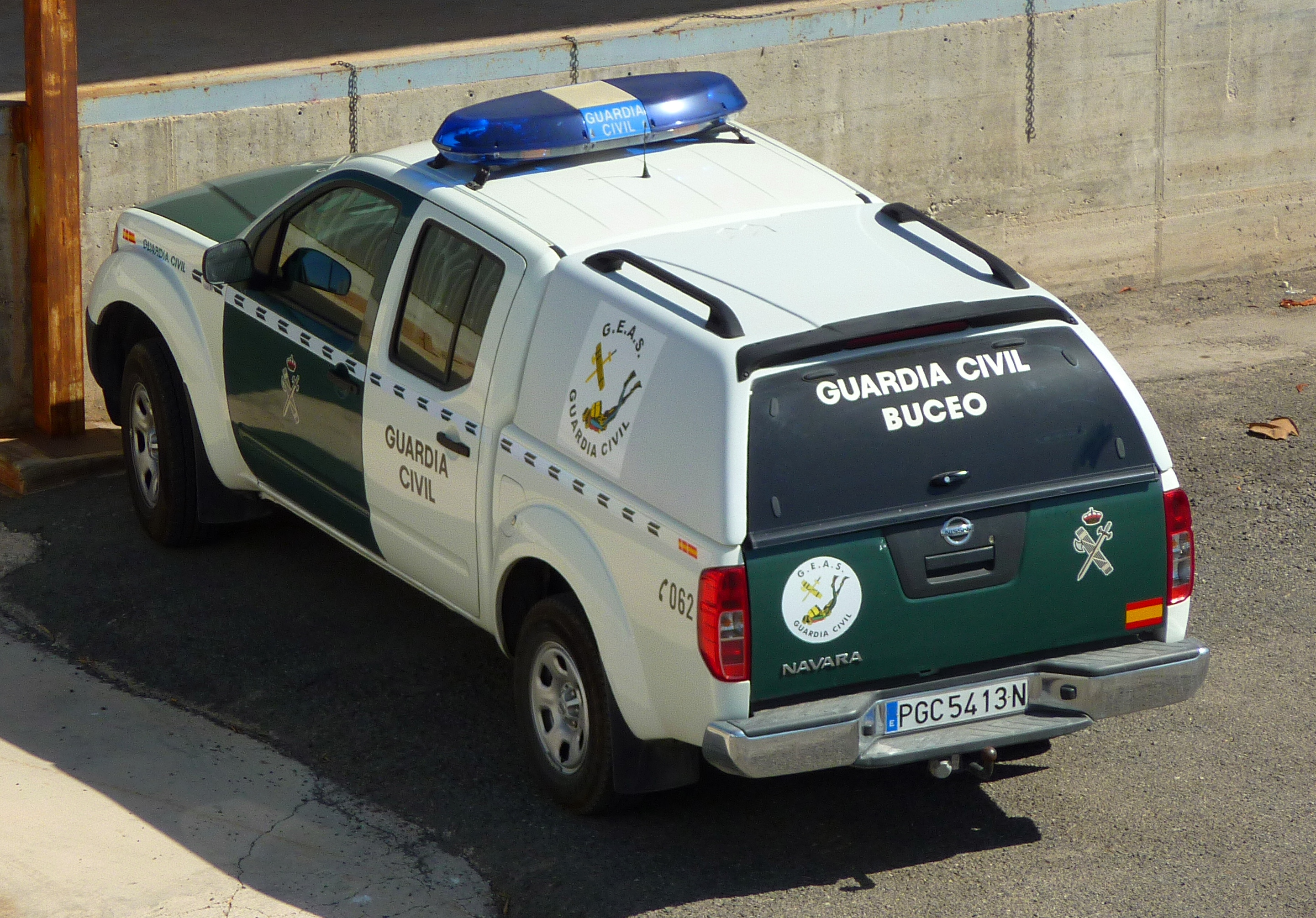 Nissan Navara GEAS Guardia Civil.